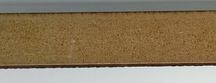 MDf-plaat vanaf de zijkant gezien, hierin is de fijne vezelstructuur te zien.